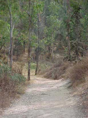 Ladera del Cerro de la Estrella, en Iztapalapa. Fue declarado parque nacional de México en 1938 por el presidente Lázaro Cárdenas. En 1991 fue cambiado su estatuto al de área natural protegida.